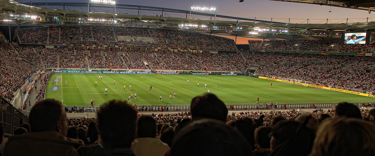 Mercedes-Benz-Arena im Neckarpark Stuttgart während des offiziellen Einweihungsspiels nach dem Umbau (Deutschland-Brasilien, 10.08.2011)